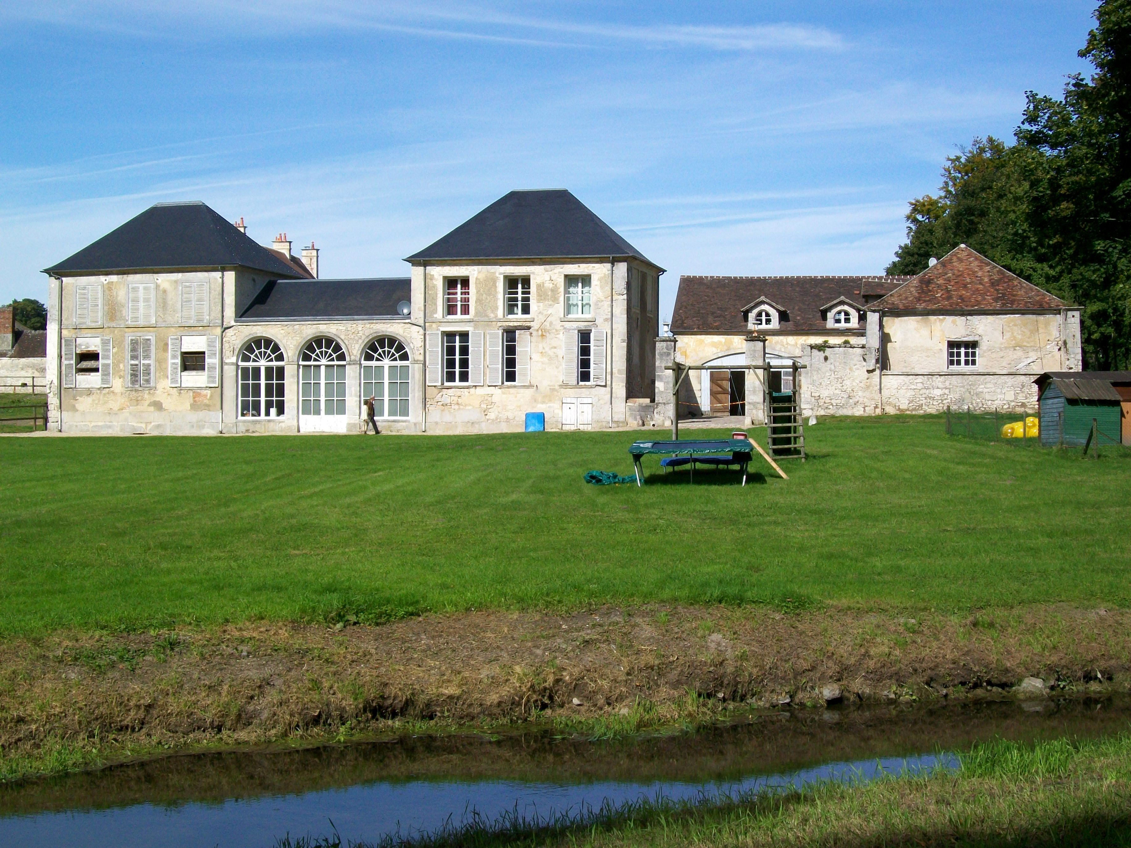 Vue sur une partie des communs de l'abbaye avec l'orangerie (désignée comme les serres sur un plan ancien du domaine) ; à droite, des bâtiments de la ferme de l'Abbé.